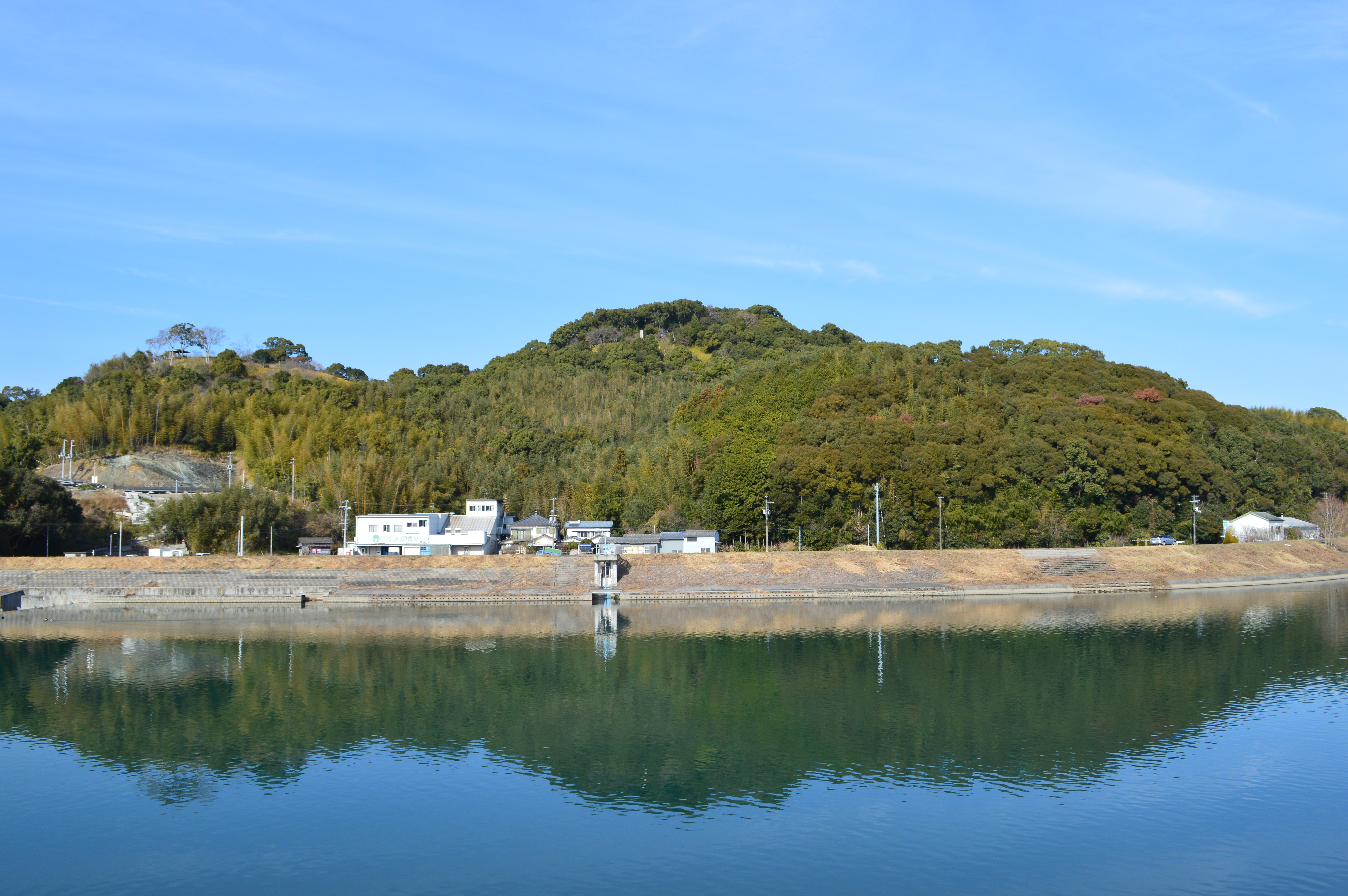 岡豊城 全景